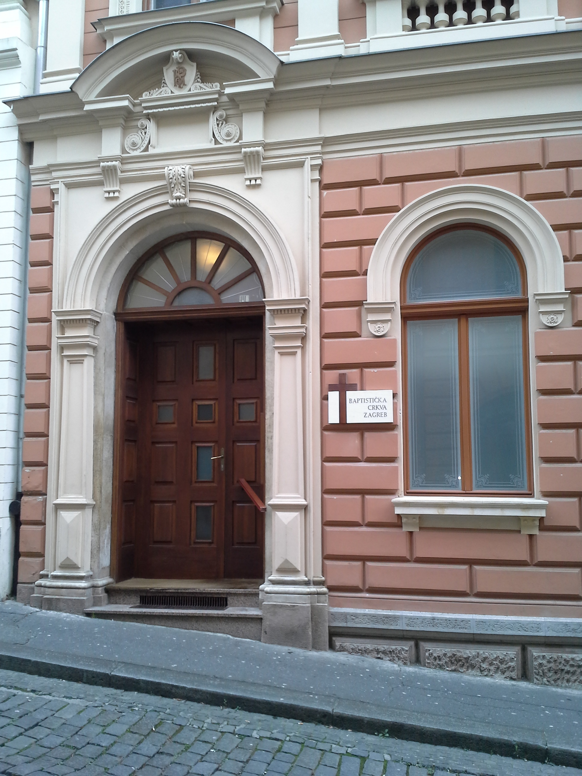 Српски (ћирилица): Baptistička crkva Zagreb